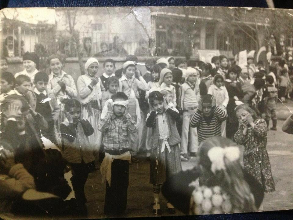 Göktürk İlköğretim Okulu, 23 Nisan 1986